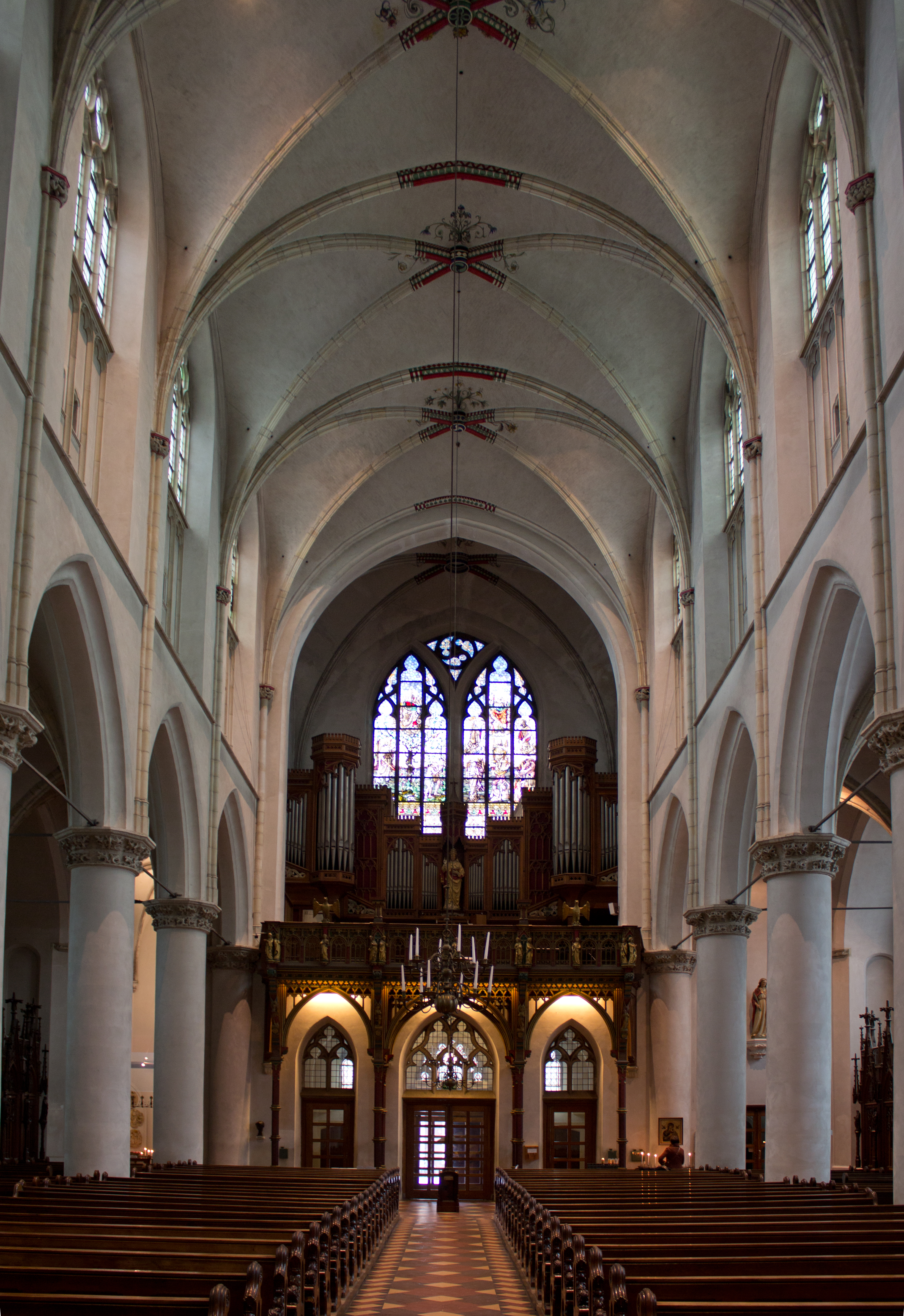 De kerk van het voormalige Catherijne Convent te Utrecht.